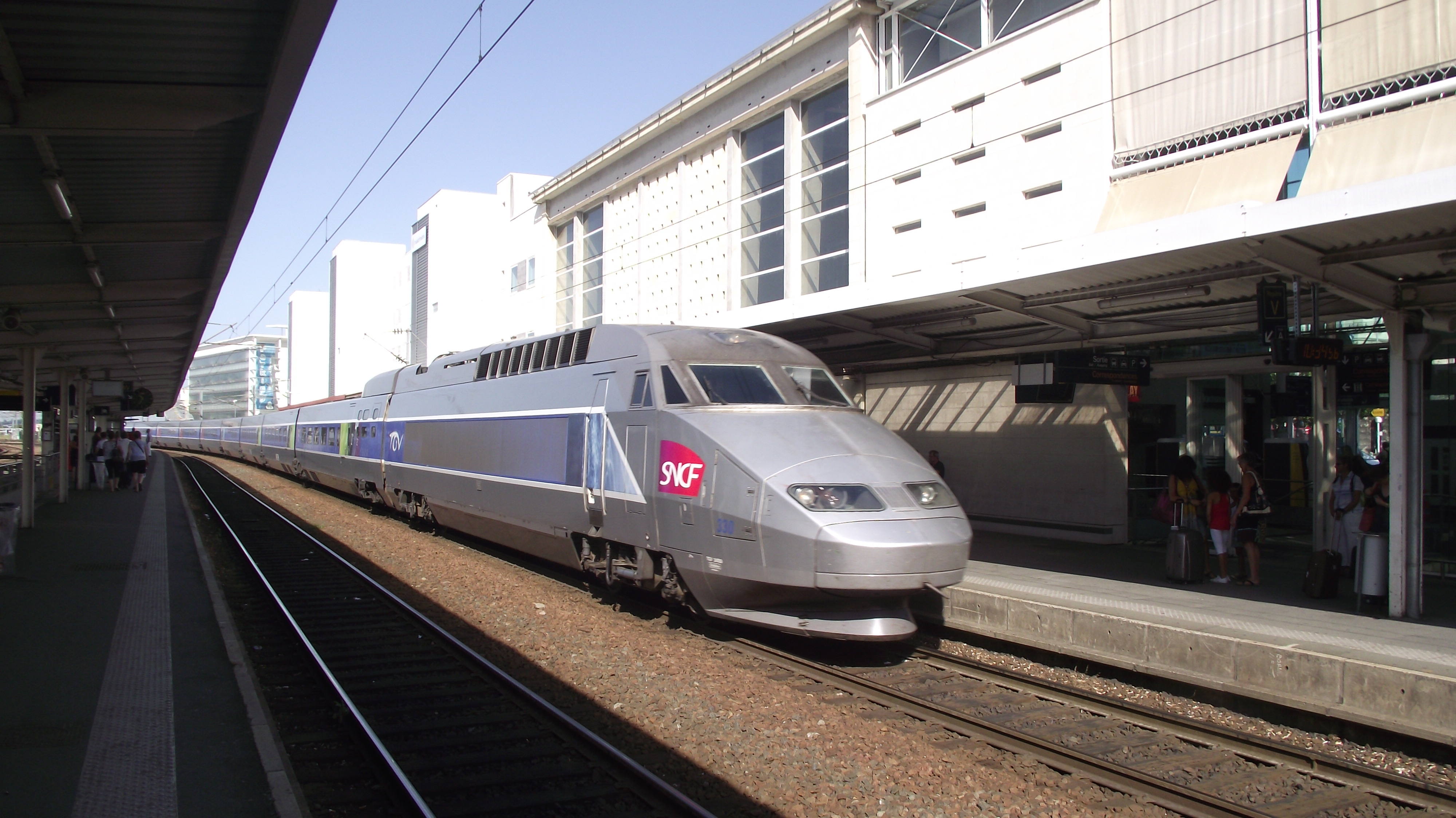 TGV Atlantique naar Parijs